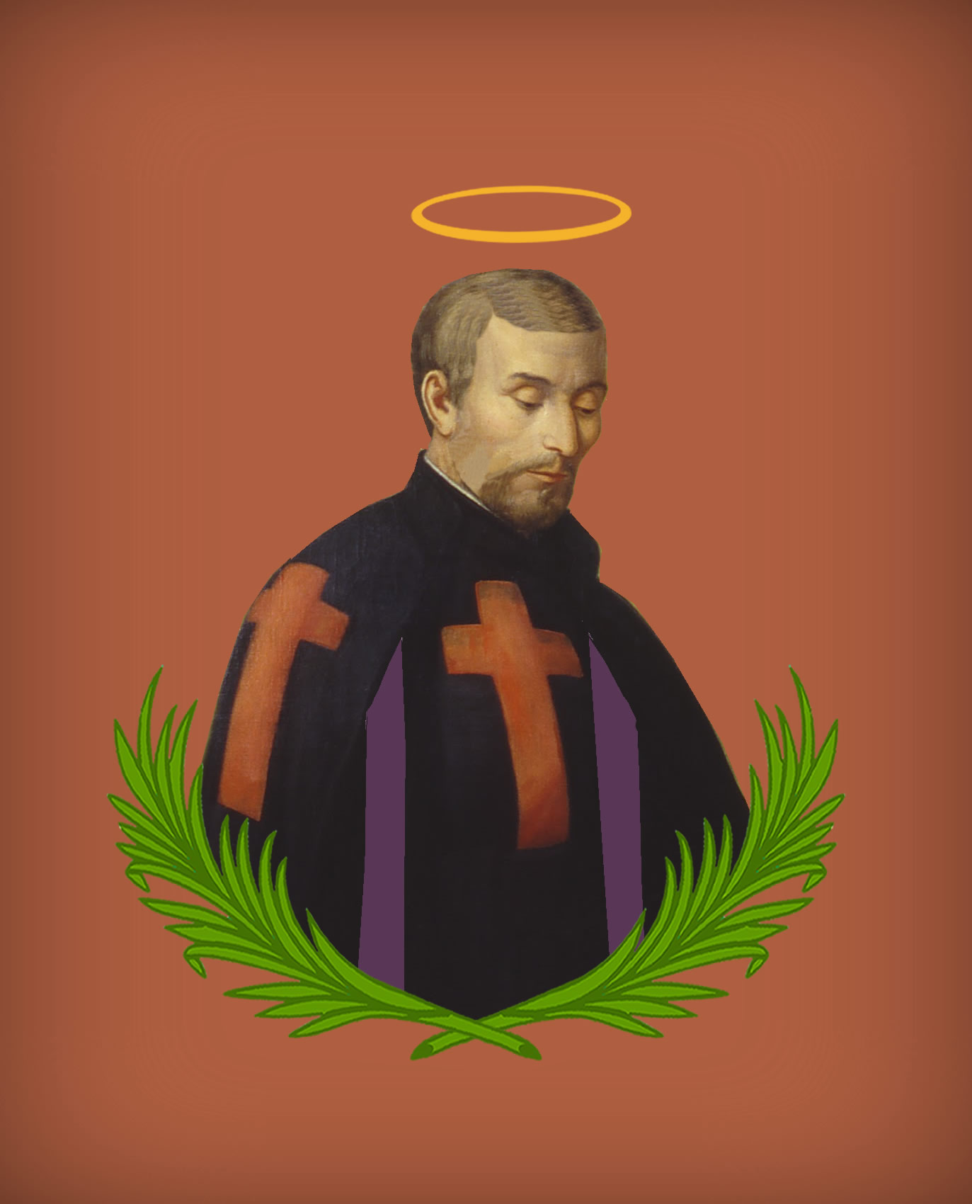 Imagen del Protomártir Camiliano Pedro Marieluz Garcés